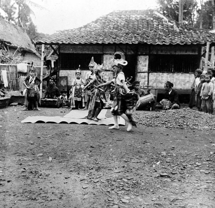 Repronegatief. Javaanse dans op een erf te Cheribon